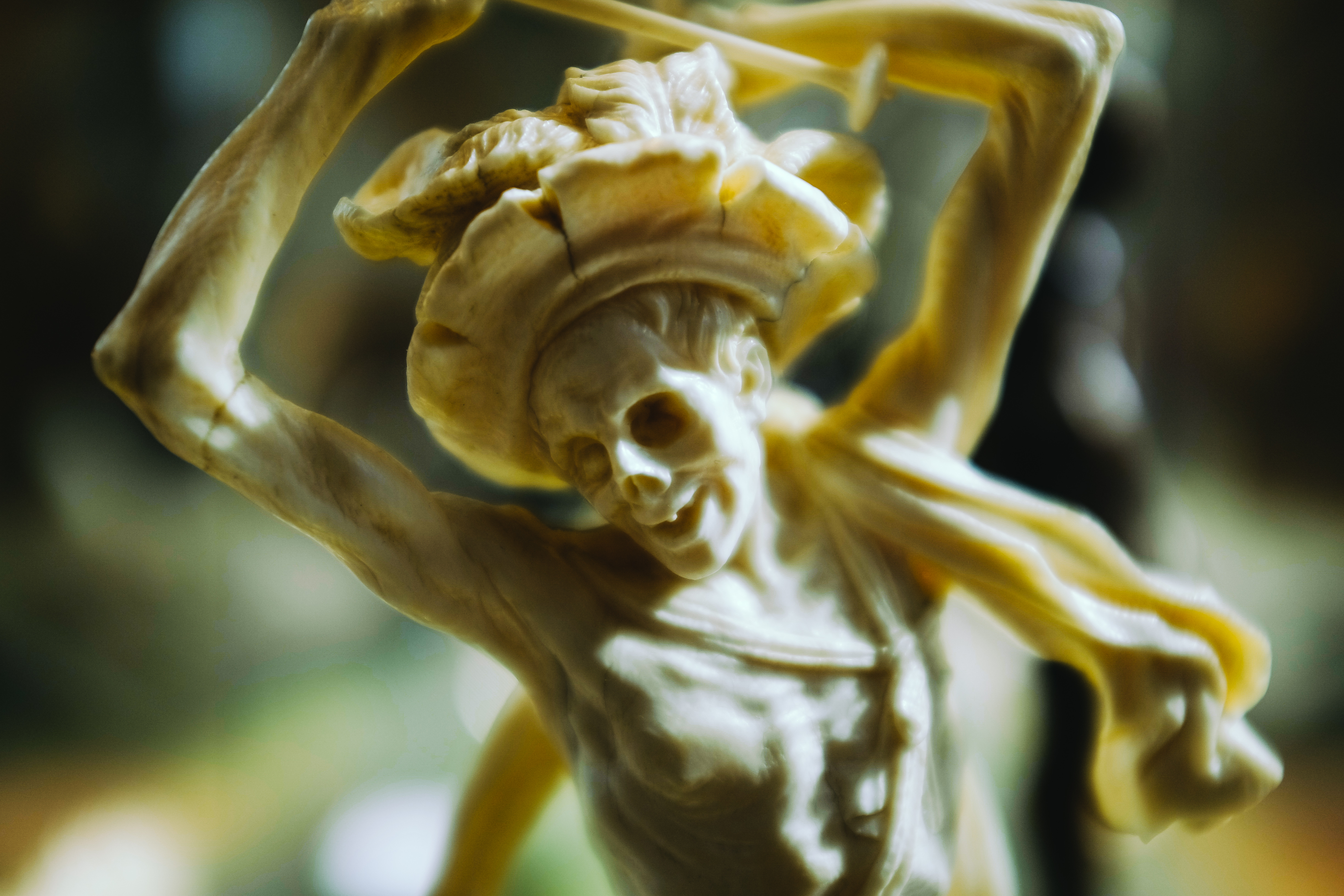 Fujifilm